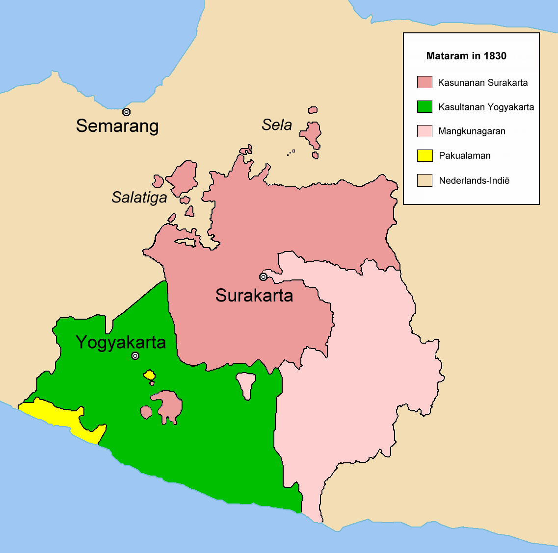 Kaart van Nieuw Mataram na de Java oorlog in 1830. Deze kaart werd getekend door Meursault2004 alias Revo Arka Giri Soekatno. De bron was: Robert Cribb, 2000, Historical Atlas of Indonesia pagina 114. Image:Mataram 1830-en.png Gambar:Mataram Baru 1830.png